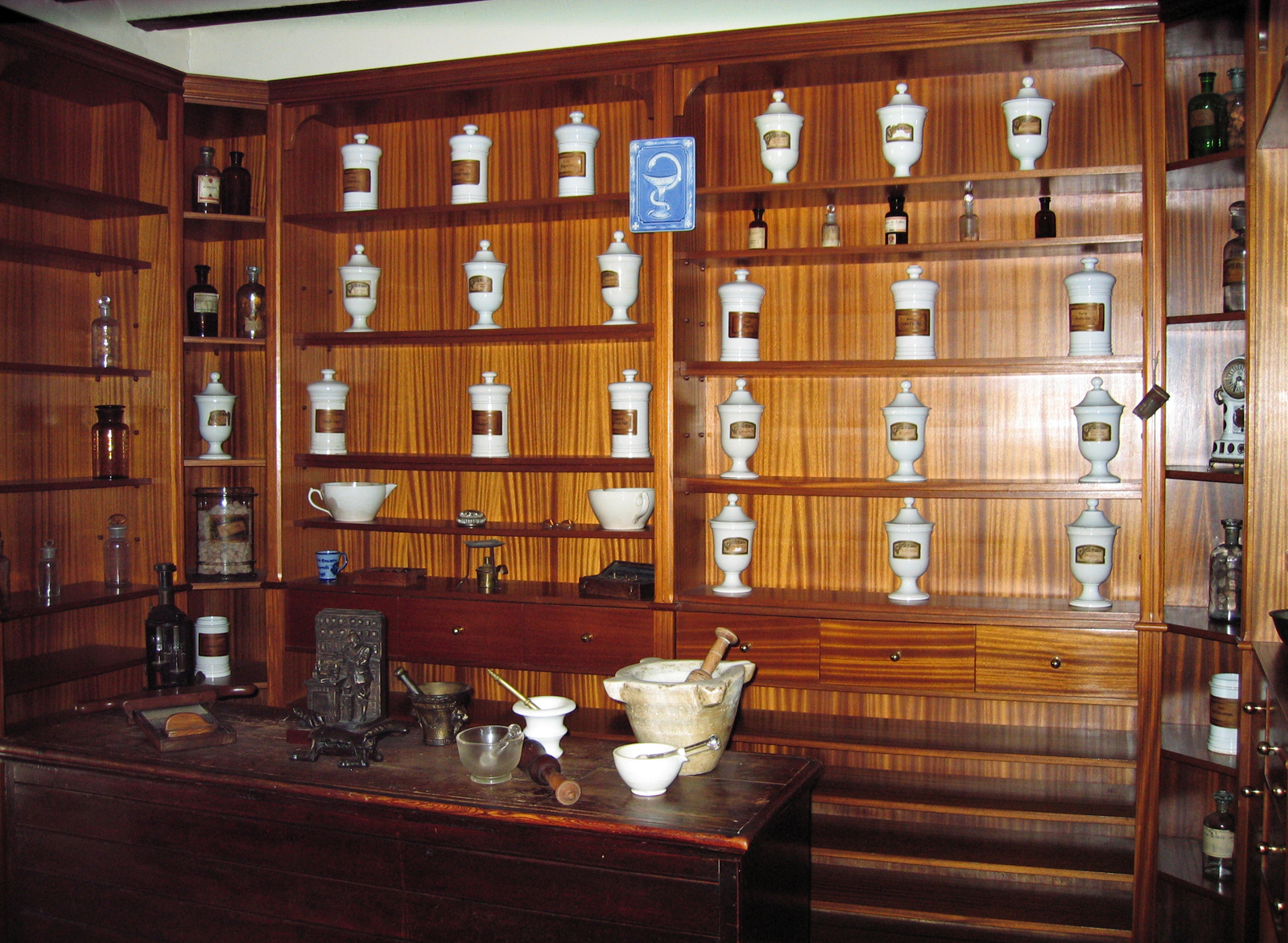 "La Botica de los Aadémicos" a Argamasilla de Alba. Trobada Cervantina dels "Acadèmics" en el Tercer Centenari de Quixot per escriure la Ruta del Quixot en l´any 1905.